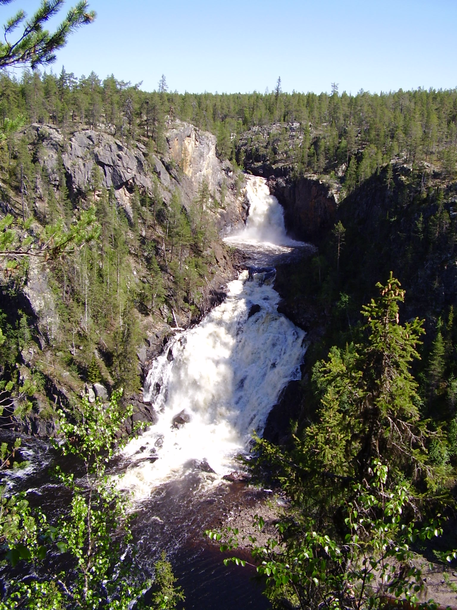 Wasserfall im Nationalpark Muddus